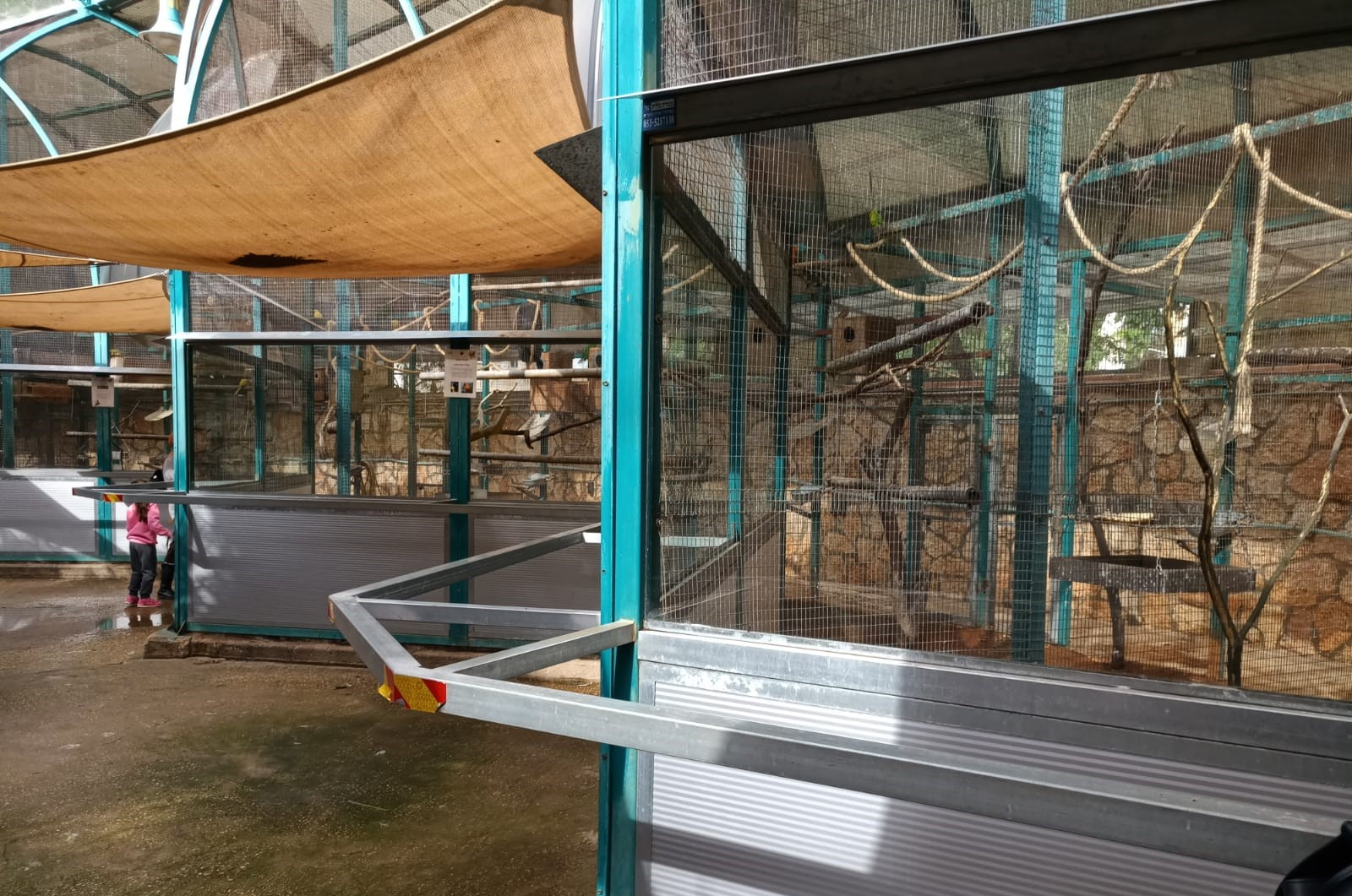 גן החי